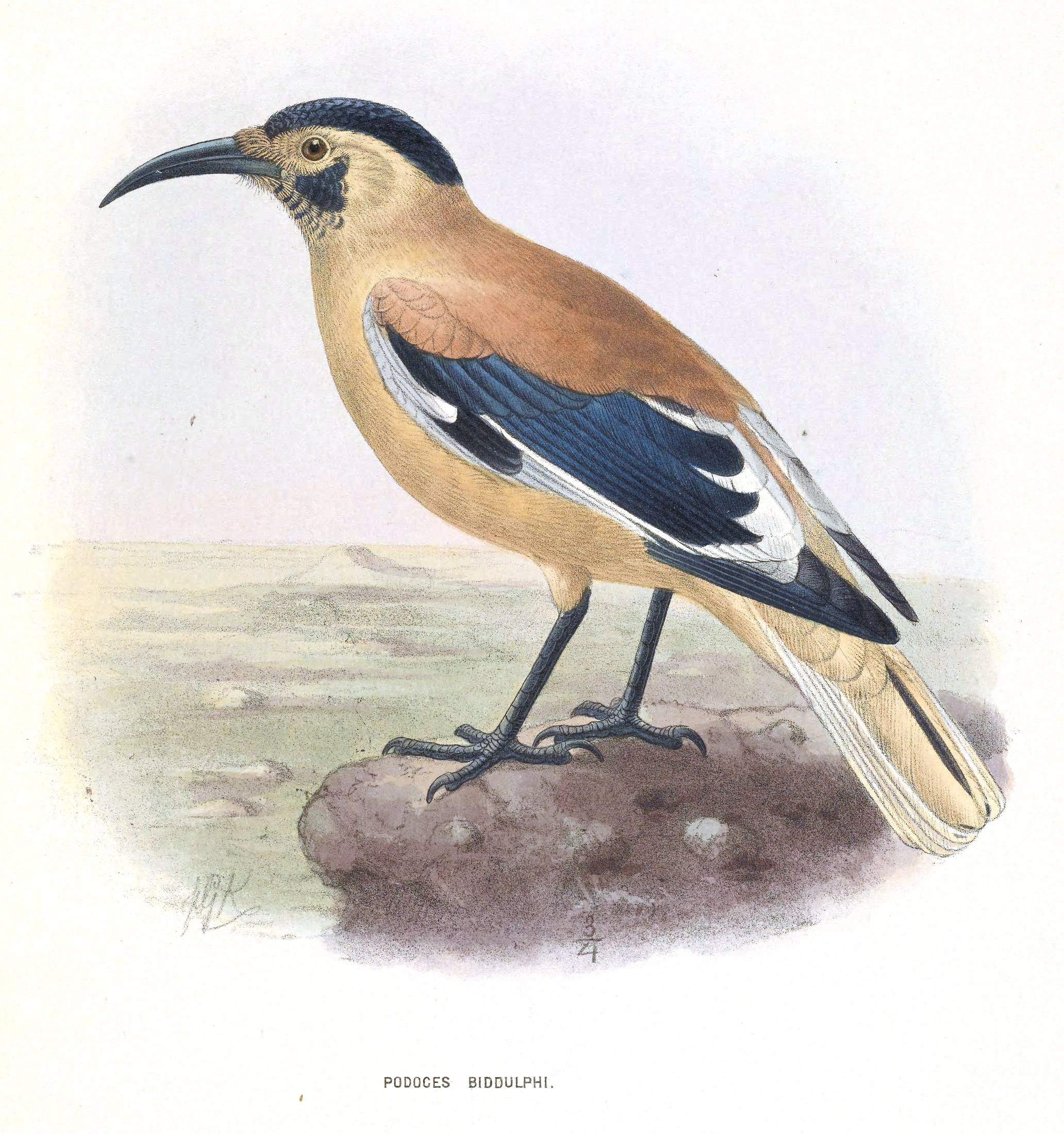 Podoces biddulphi